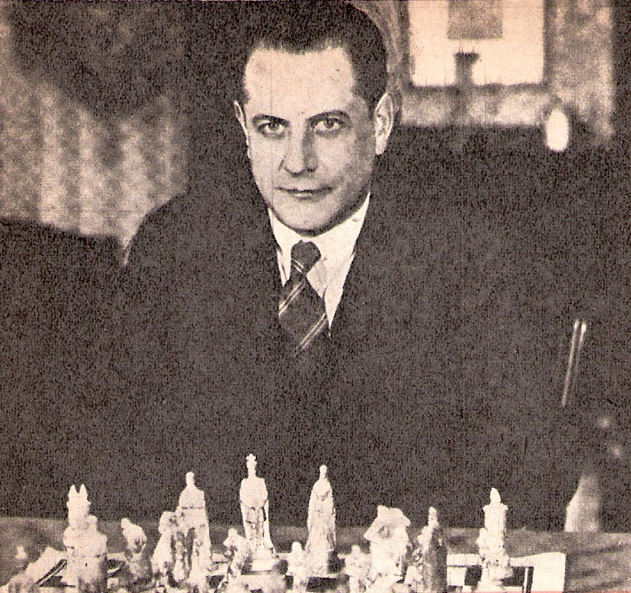 José Raúl Capablanca, ajedrecista cubano